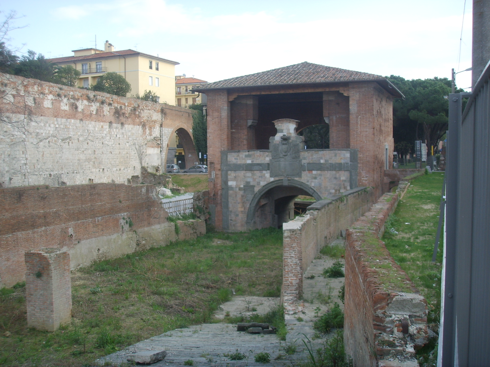 Canale_mediceo